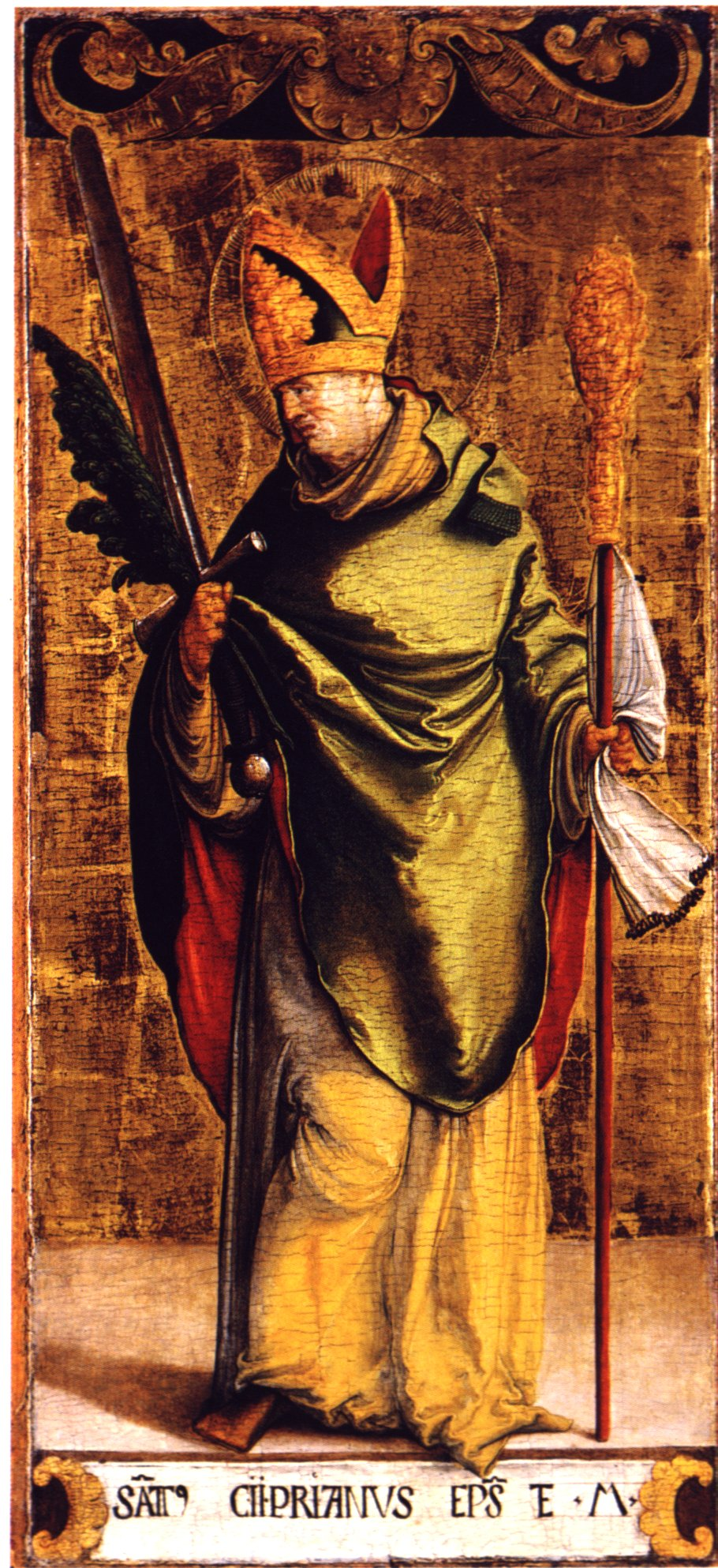 Ausstattung der ehemaligen Seitenaltäre der Meßkircher St. Martinskirche, Standflügel: als Bischof und Märtyrer